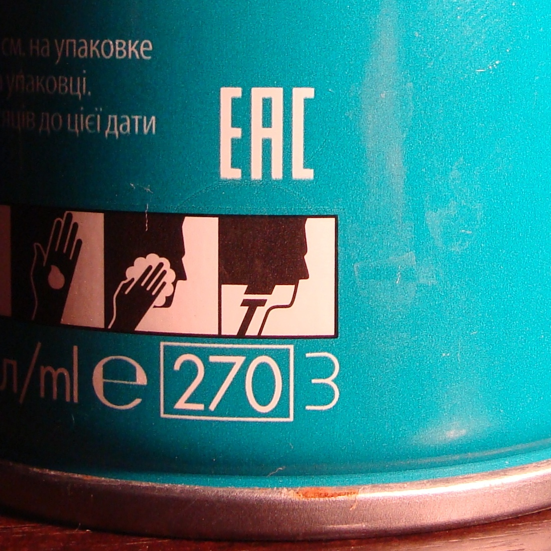 Знак EAC на креме для бритья